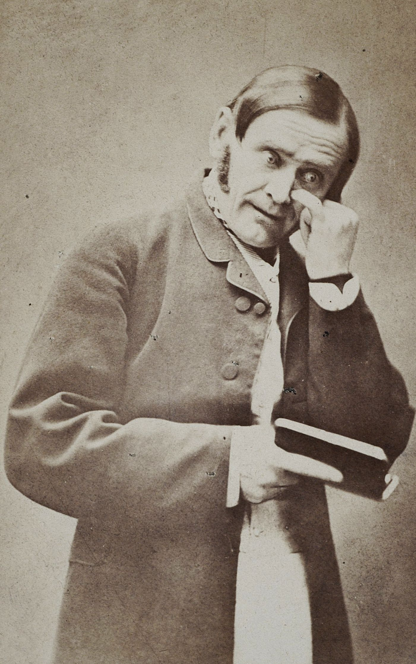 Jan Walery Królikowski